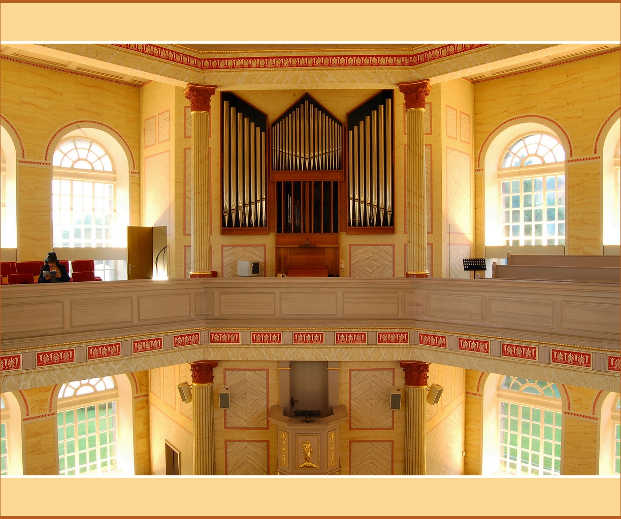 Erbaut zwischen 1822 und 1824 vom preußischen Architekten Karl Friedrich Schinkel im klassizistischen Stil mit achteckigem Grundriss.